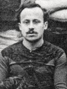 Alfred Mayssonnié en 1908 (cropped).